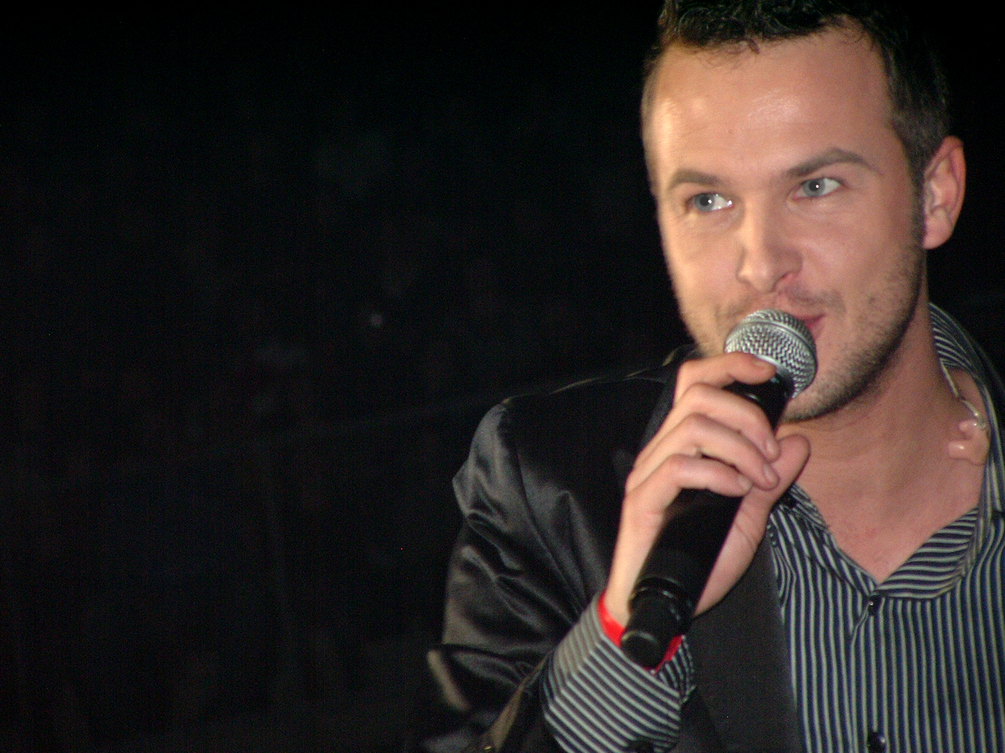 Stan Van Samang op 1 februari 2008 tijdens Steracteur Sterartiest Live on Stage, Lotto Arena Antwerpen.